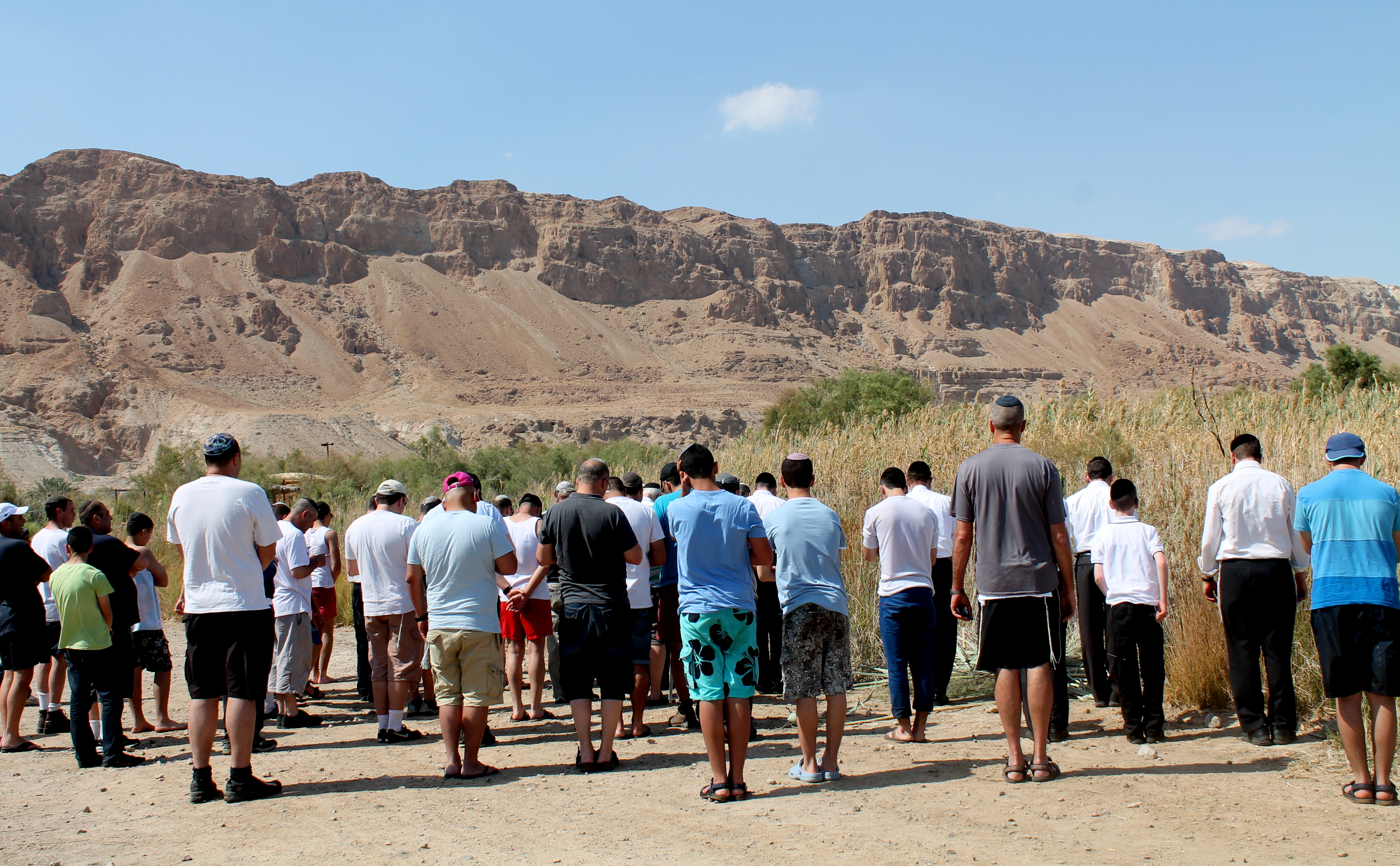 תפילת שמונה עשרה נוסח בינהזמנים